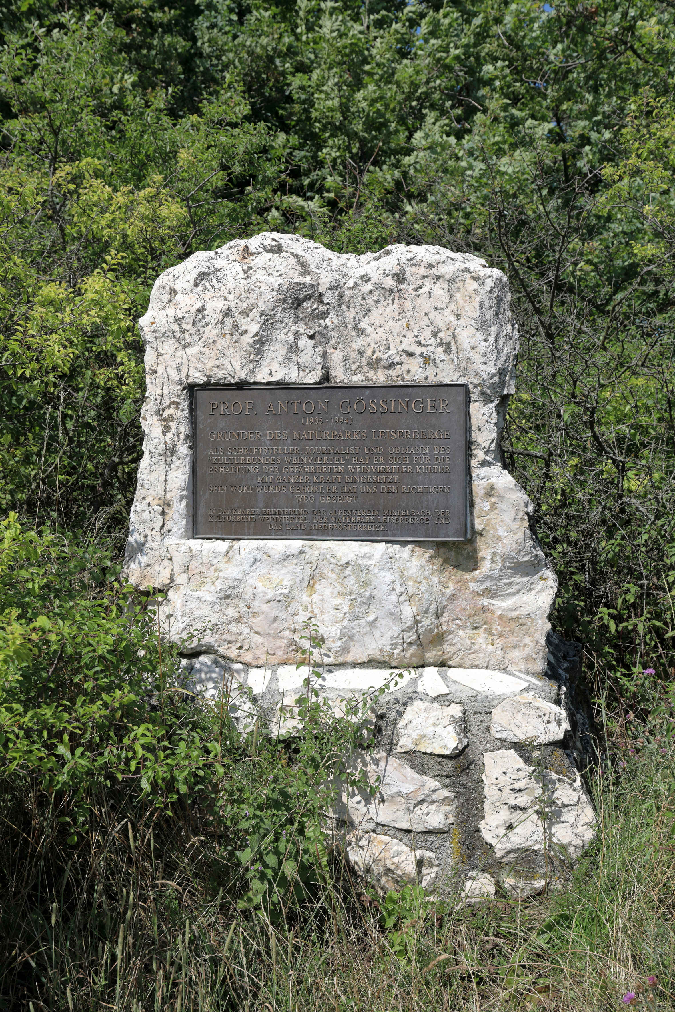 Der 2004 enthüllte Gedenkstein zu Ehren von Anton Gössinger am Buschberg in der niederösterreichischen Gemeinde Gnadendorf und unmittelbar an der Gemeindegrenze zu Niederleis. Anton Gössinger war Oberstudienrat, Heimatschriftsteller und er gilt als Begründer des Naturparkes Leiserberge.